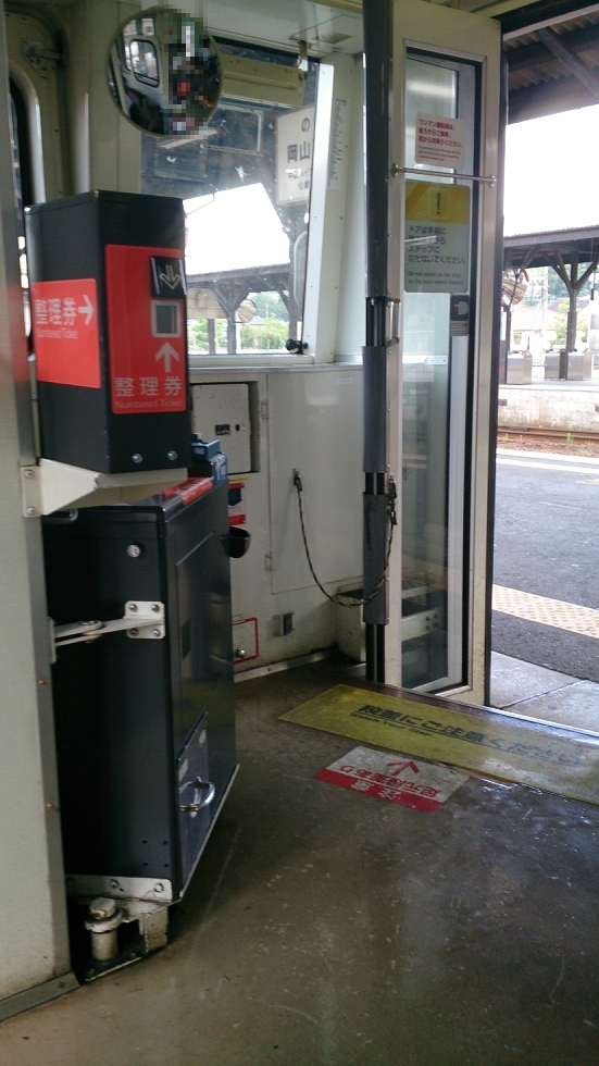 キハ120の前方右側入口です。